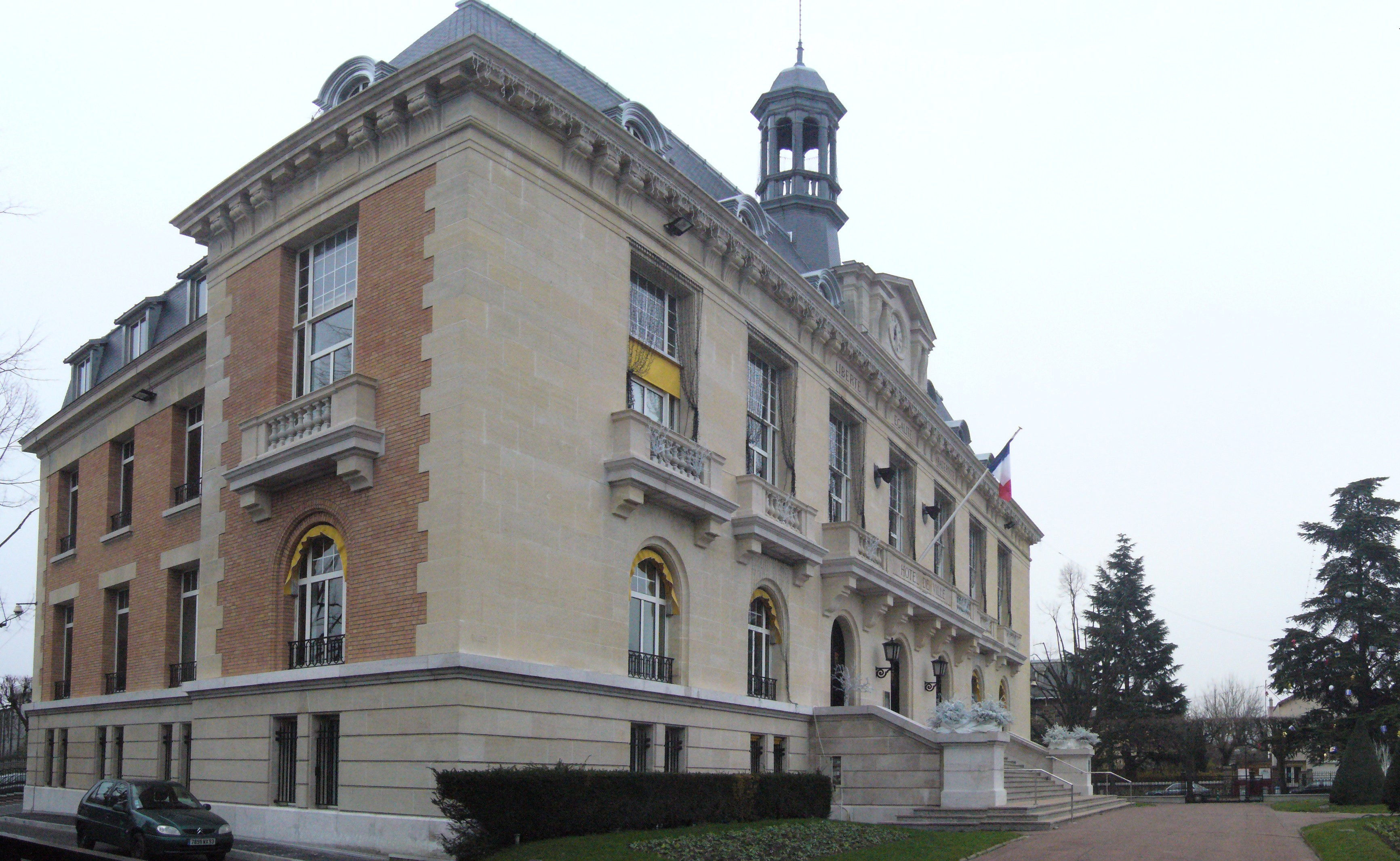 Vue panoramique de la mairie d'Aulnay-sous-Bois / Panoramic view of Aulnay-sous-Bois (Seine-Saint-Denis, France) city hall.